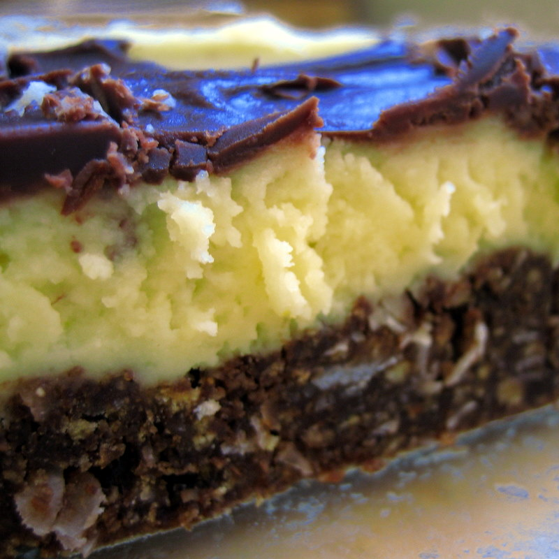 Nanaimo bar detail.